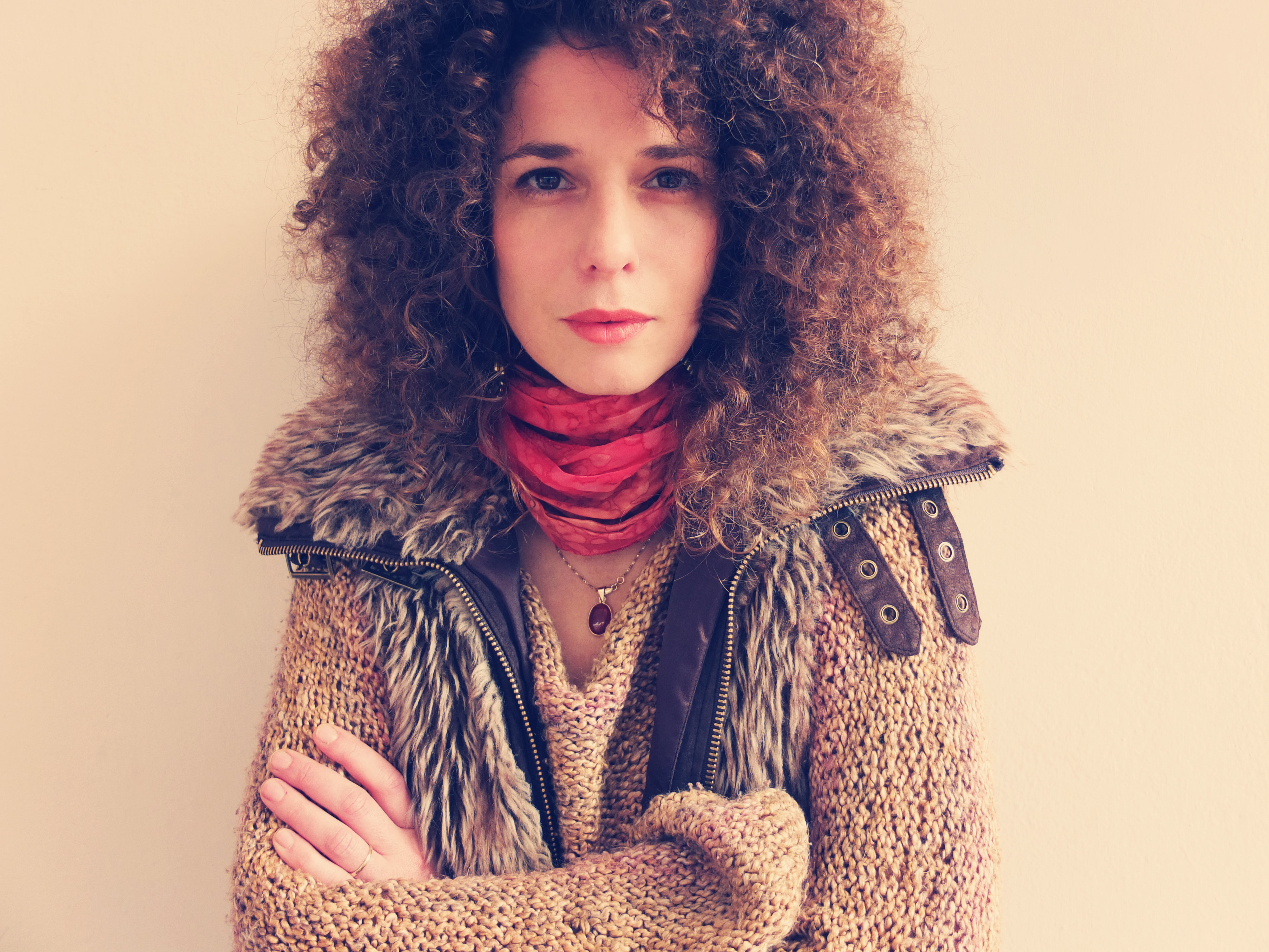 צילום: רונן ללנה